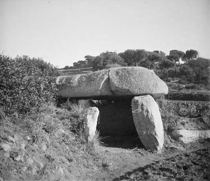 Imatge